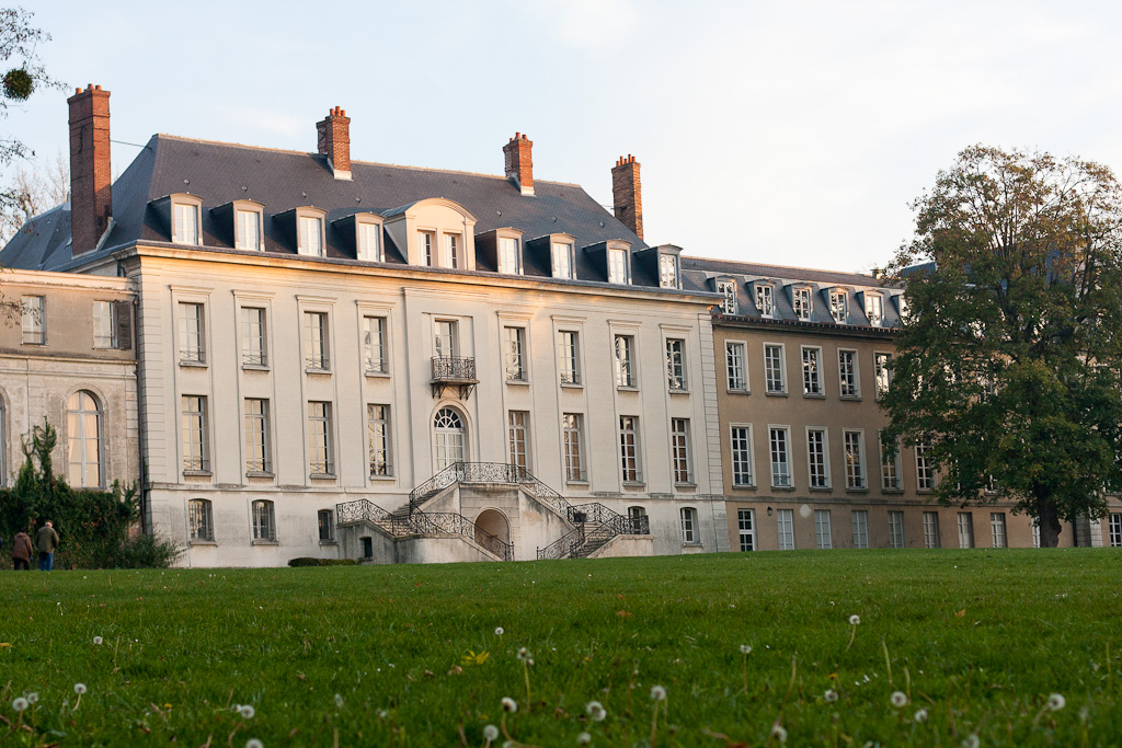 Morsang-sur-Orge (Essonne, Île-de-France, France) - Château de Morsang.